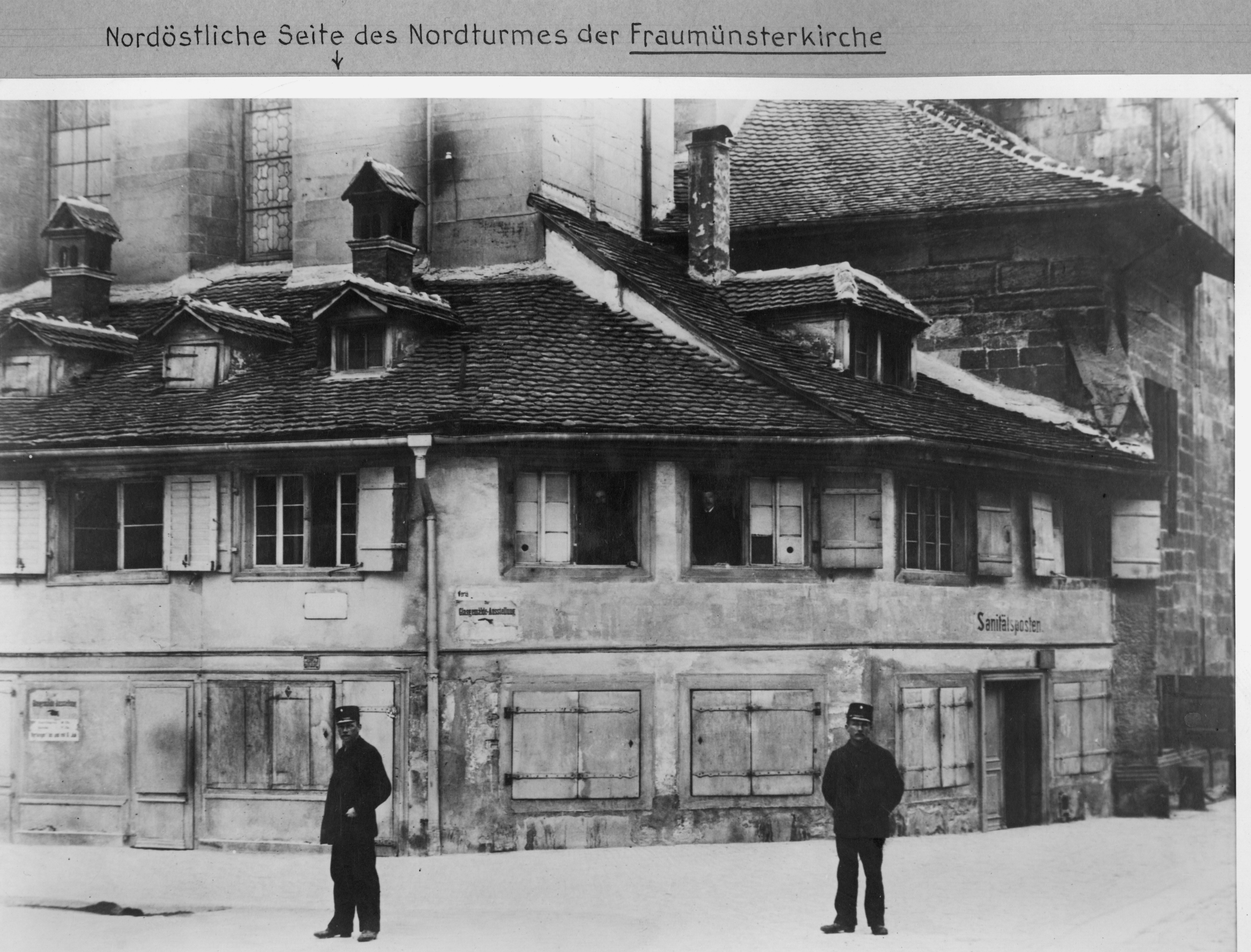 Fraumünster mit angebauten Gewerbehäuser (Schwalbennester), Zürich, Schweiz